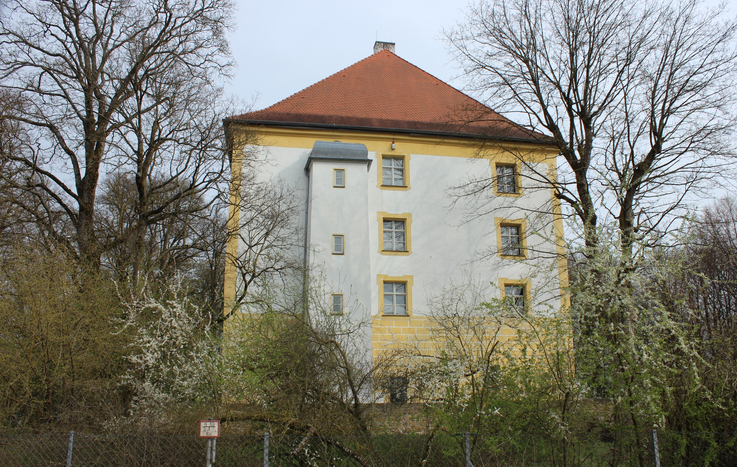 Westansicht des Schlosses Loham, Schlossstraße 2 in Mariaposching. Das ehemalige Wasserschloss wurde im 16. Jahrhundert erbaut und ist mit einem weitflächigem Garten und Zaun umgeben und nicht öffentlich zugänglich.This is a photograph of an architectural monument.